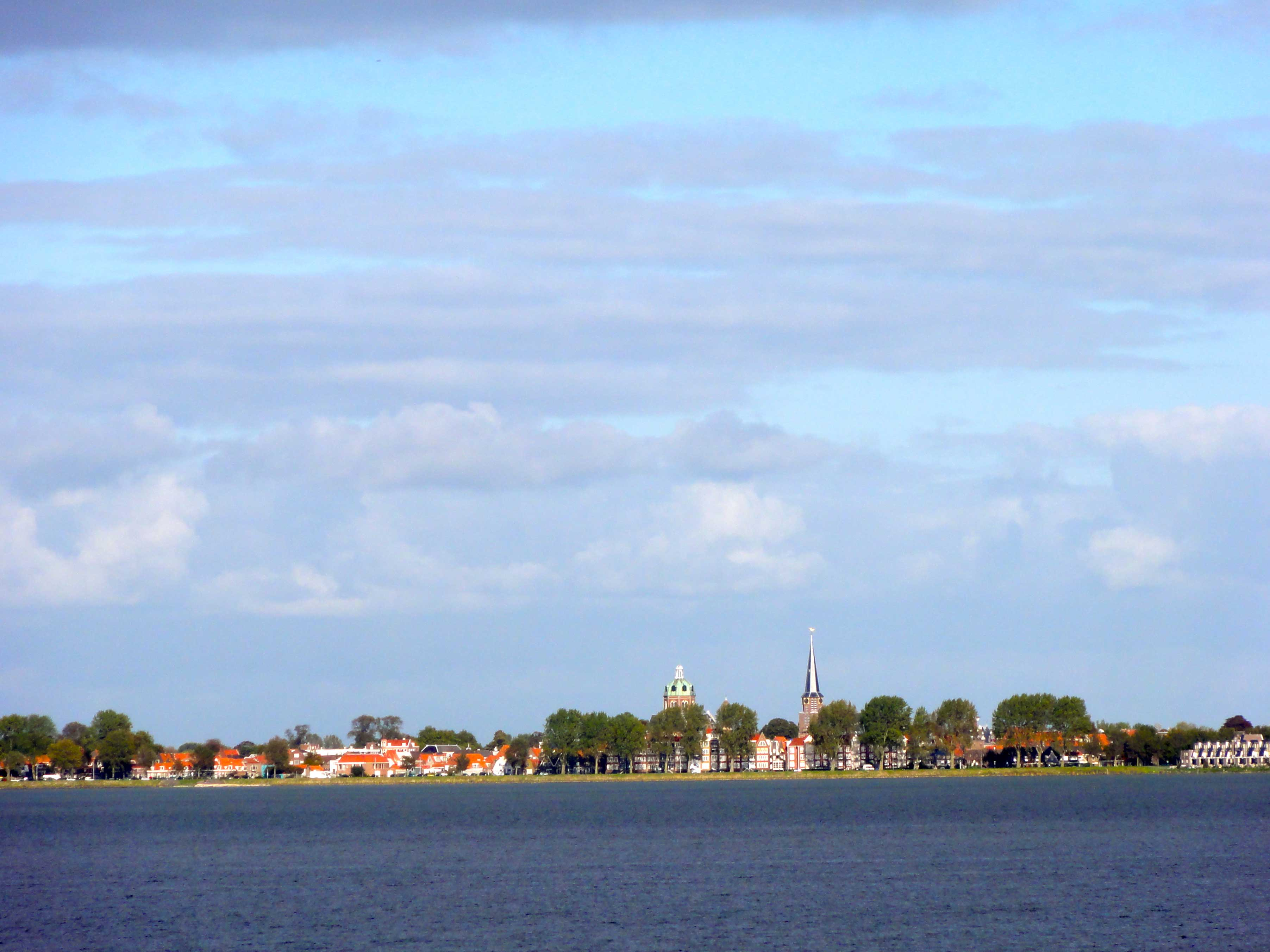 Zicht op Hoorn aan de Hoornse Hop